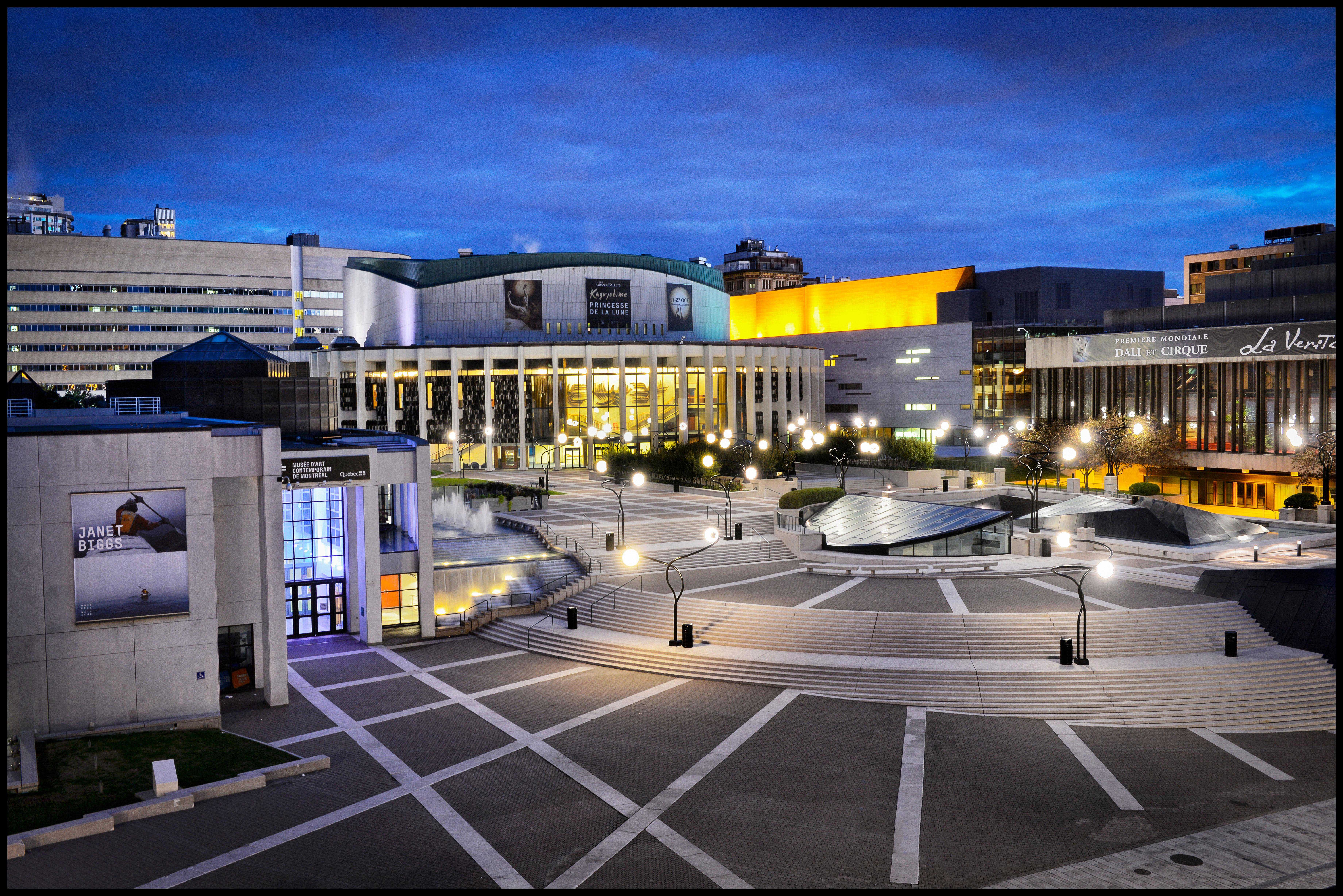 Société de la Place des Arts de Montréal